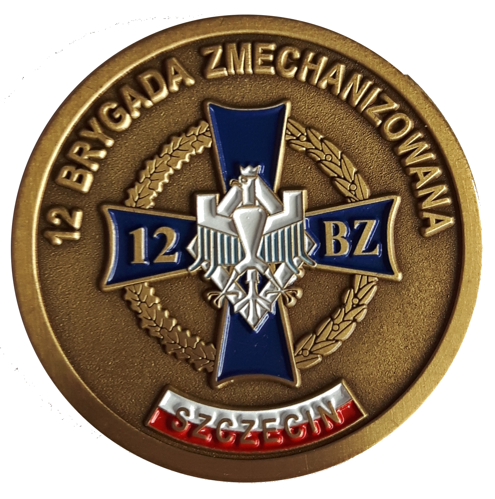 medal pamiątkowy 1 batalionu piechoty zmotoryzowanej 12 BZ